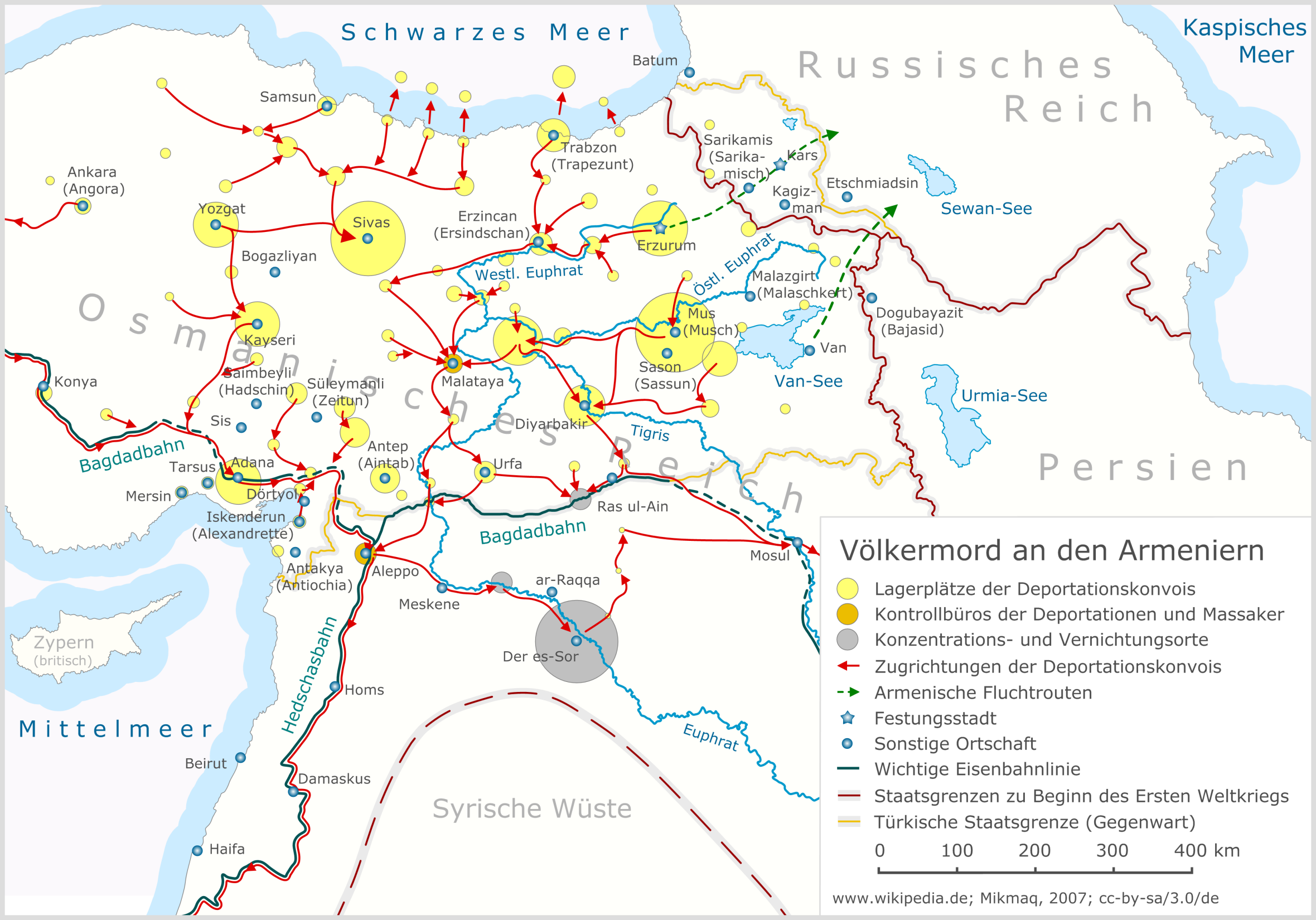 Der Völkermord an den Armeniern, Version 1.0